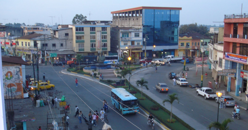 La ciudad de El Empalme en 2009